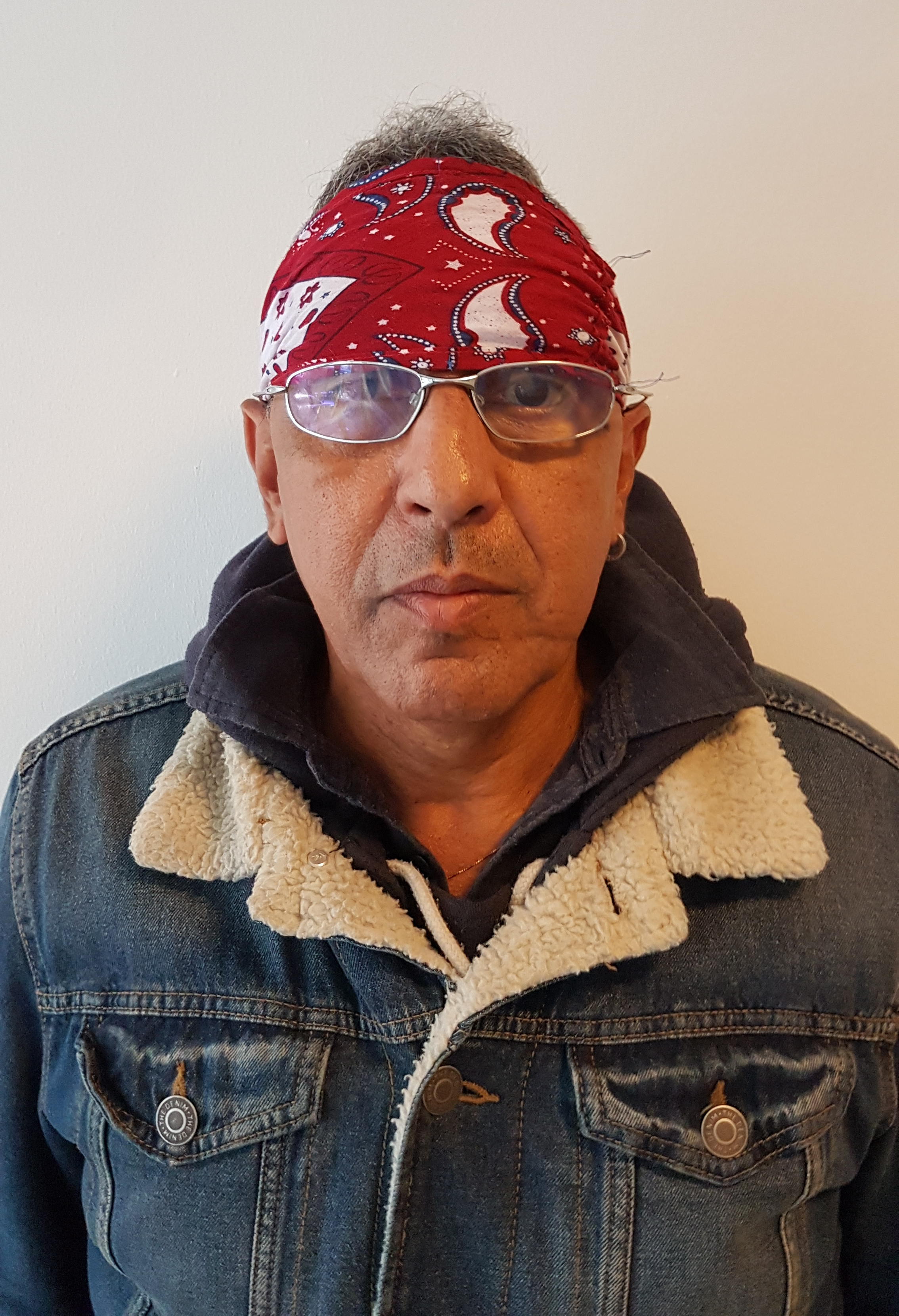 Antonio Neves Braga, artiste martial de Capoeira Angola